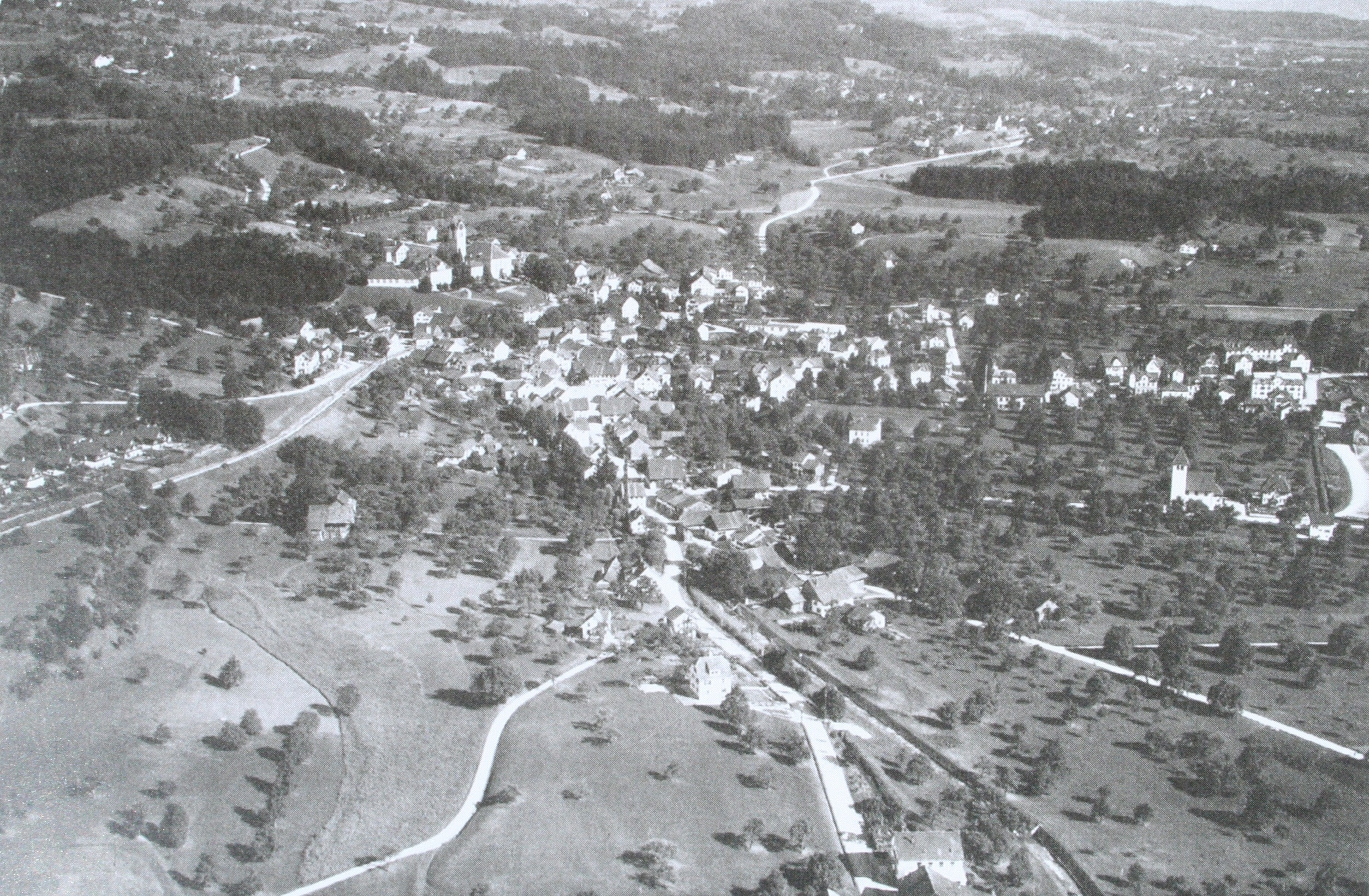 Hinwil ZH 1928, Aufnahme von Walter Mittelholzer (1894 - 1937)